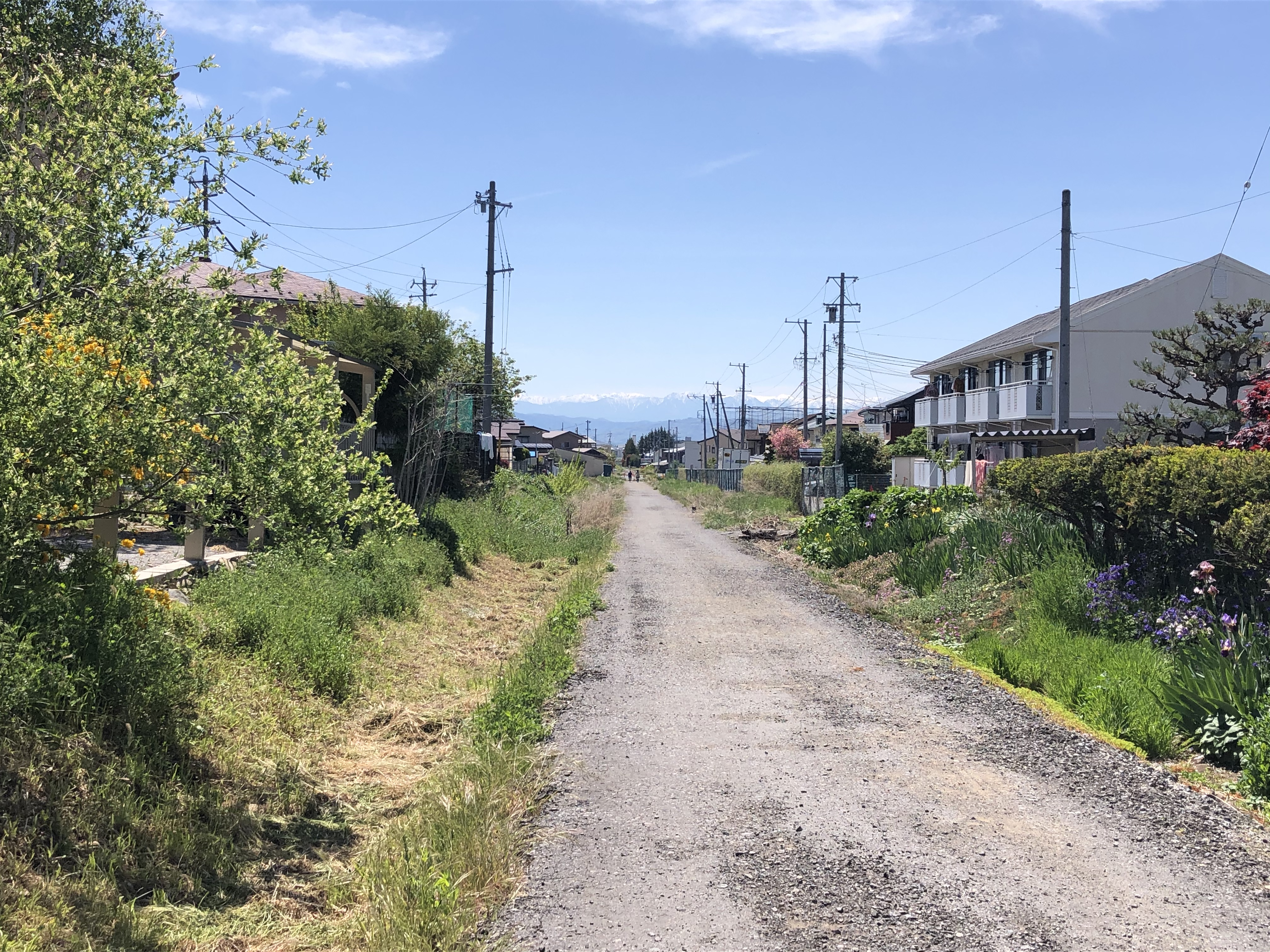 須坂市内における屋代線跡の遊歩道。